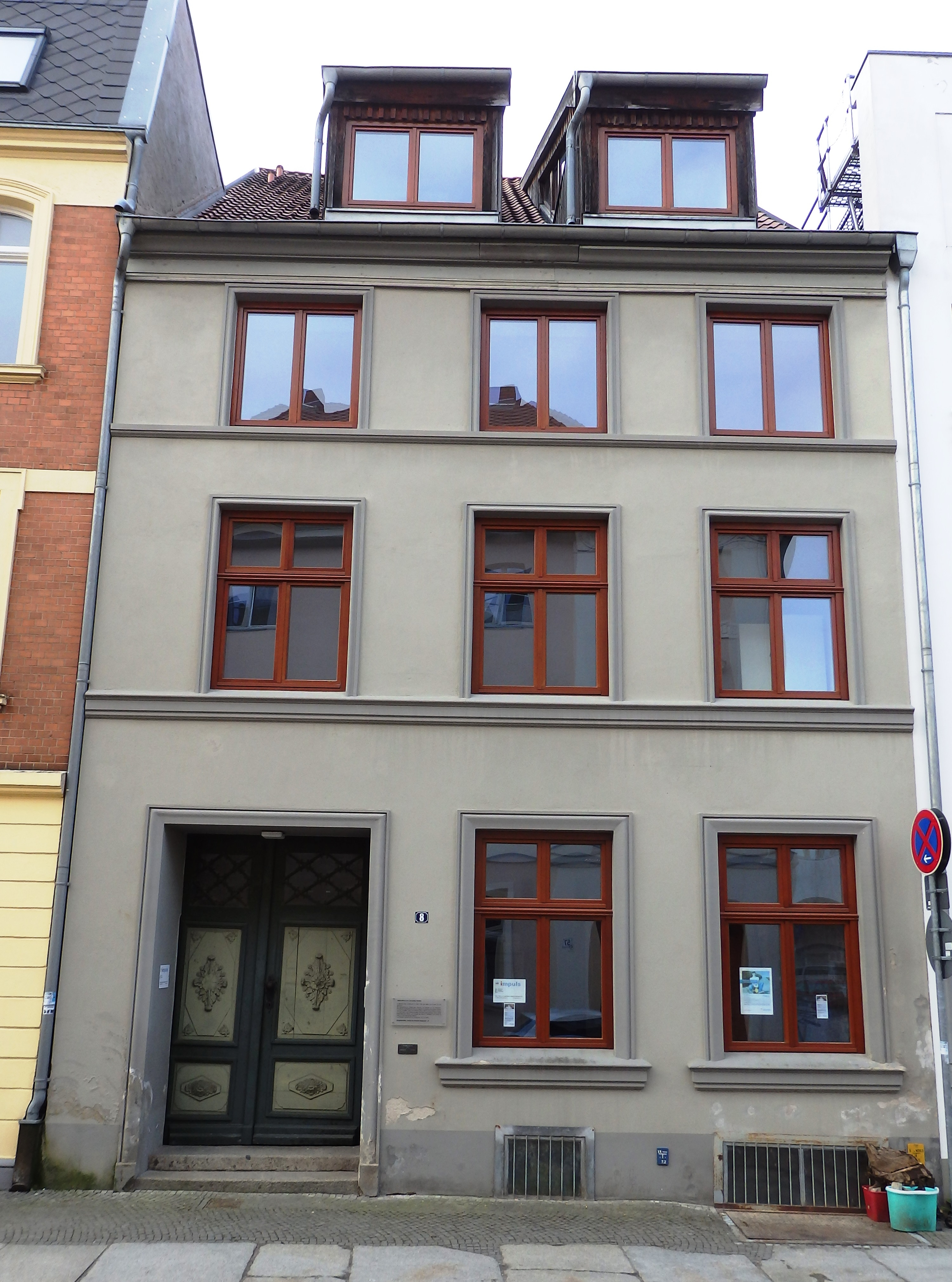 Geburtshaus von Carl Gustav Rechlin in Stralsund, Gedenktafel rechts neben Eingang